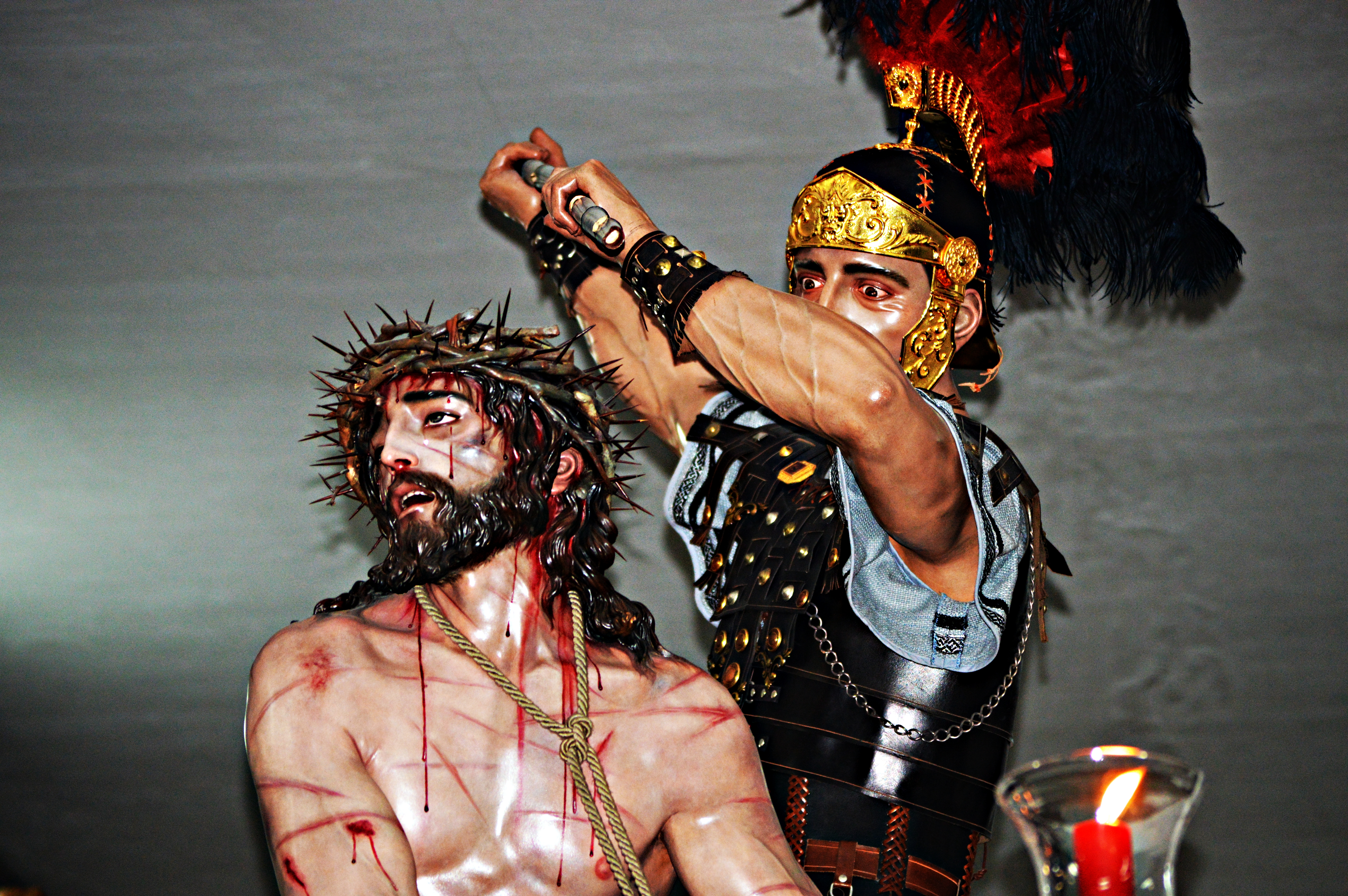 La Coronación de Espinas de Cieza, obra de Francisco Romero Zafra en 2009.